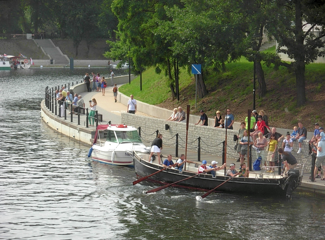 Bydgoski Festiwal Wodny 2012